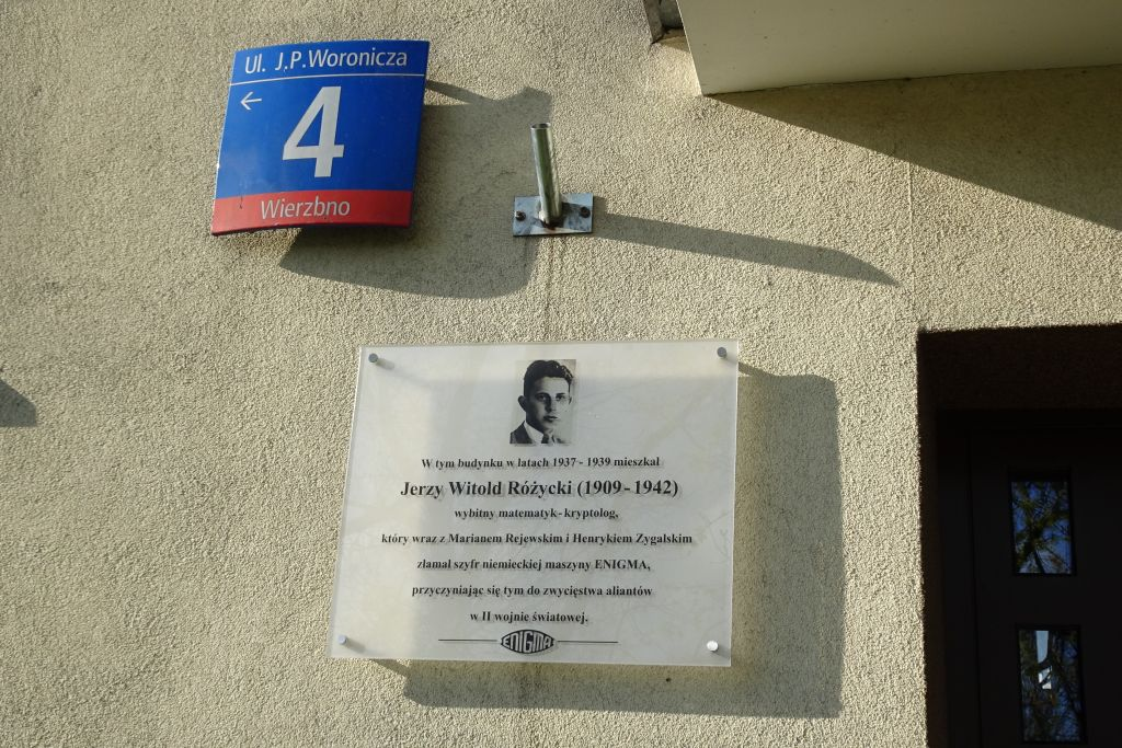 Pamiątkowa tablica na budynku przy ul. J. P. Woronicza w Warszawie, fot. Elżbieta Szczuka